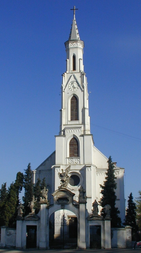 Biserica Sf. Petru si Pavel din Cluj-Napoca